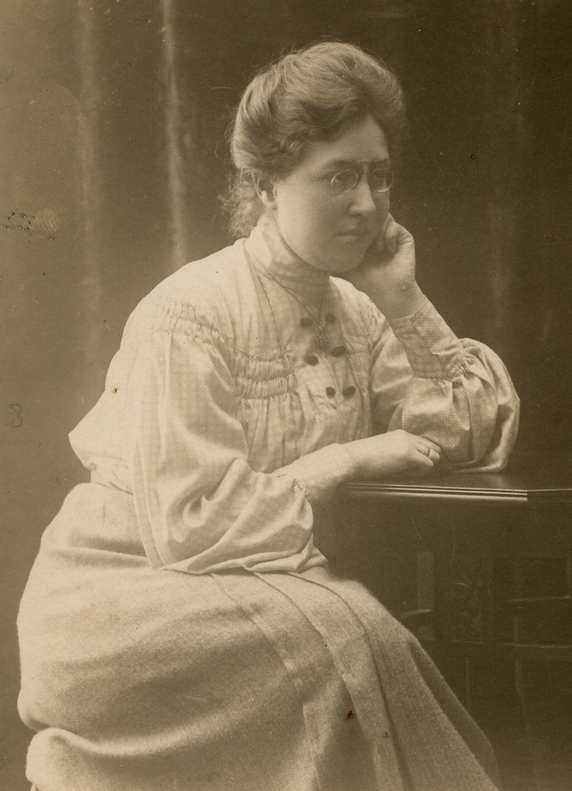 Hochzeitsbild von Rudolf und Margarete Hilferding, aufgenommen 1904